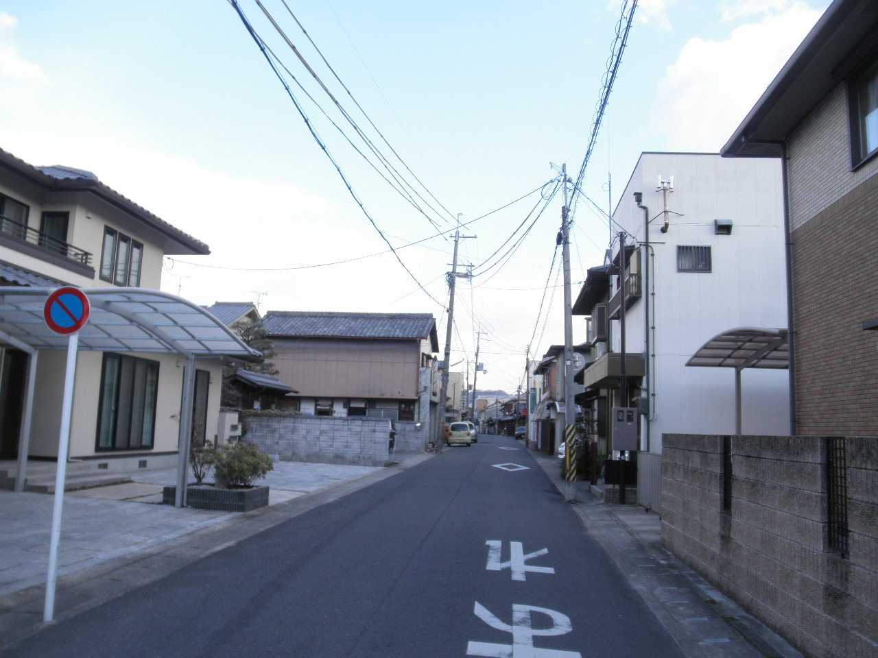 京都府木津川市山城町上狛巽町 京都府道70号上狛停車場線